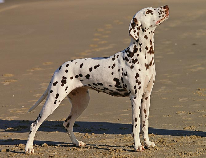 braune Dalmatinerhündin